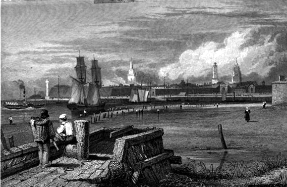 Calais